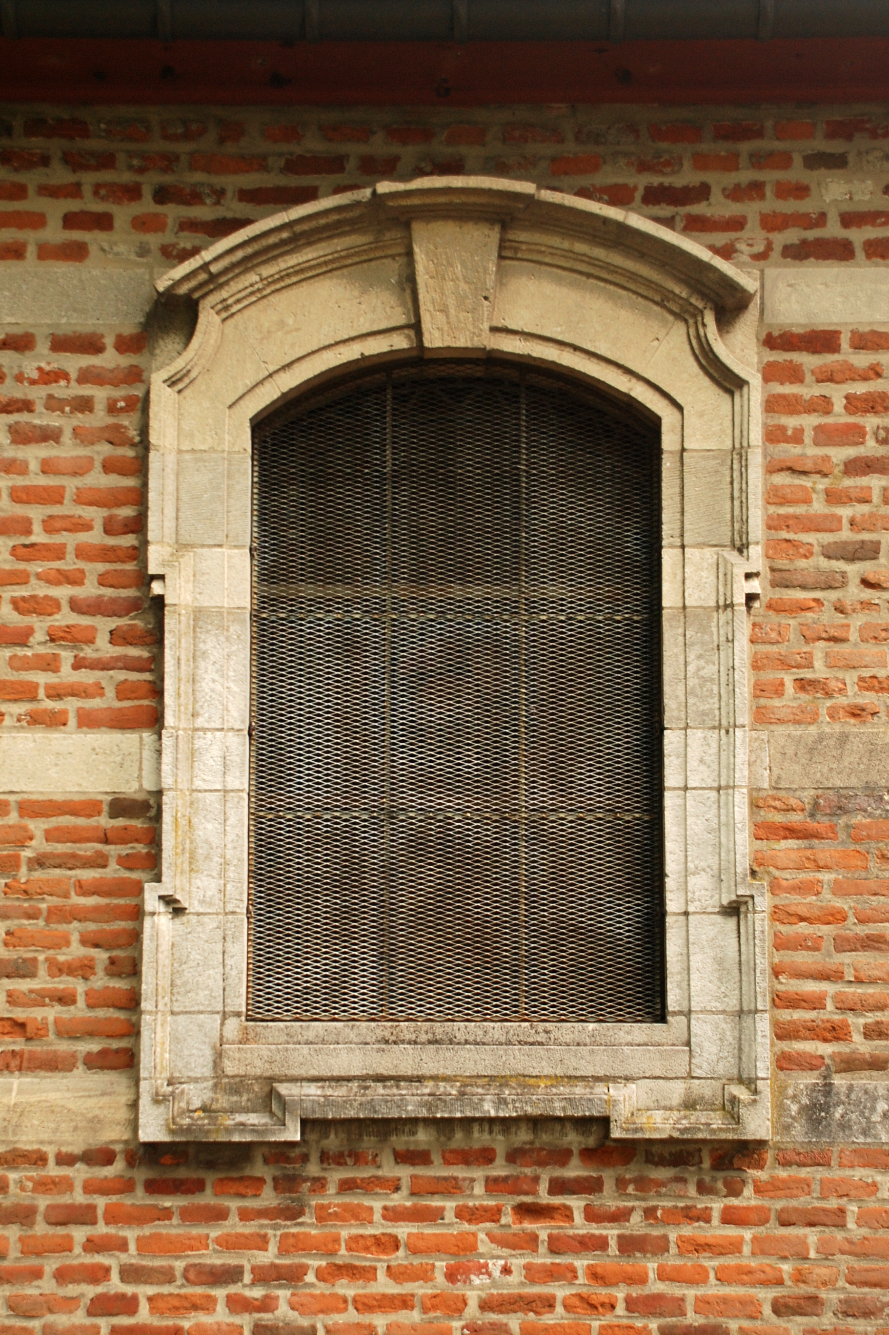 Belgique - Brabant wallon - Église Sainte-Croix de Rixensart